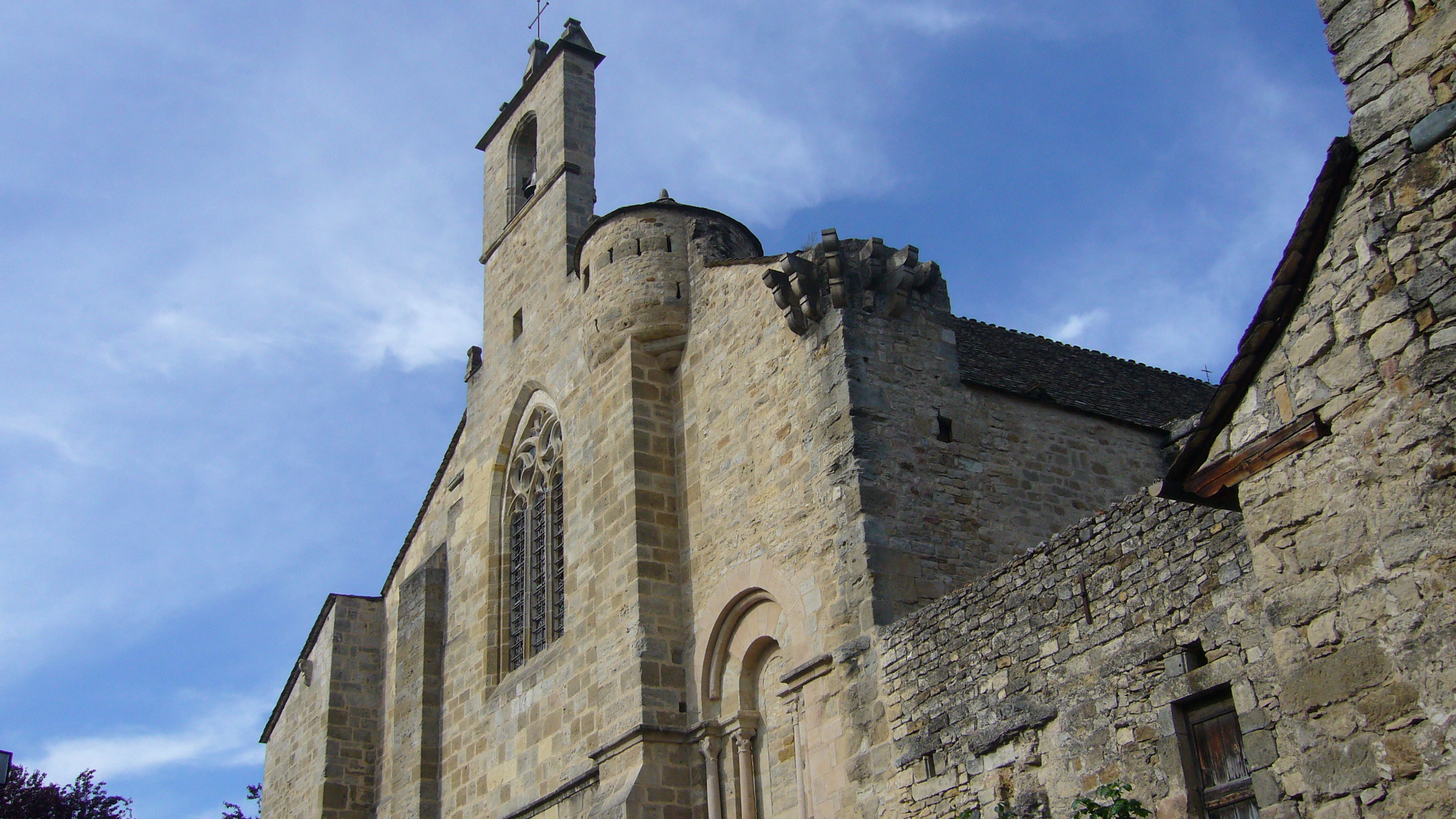 L'église du Monastier (Le Monastir-Pin-Moriès, Lozère, France)